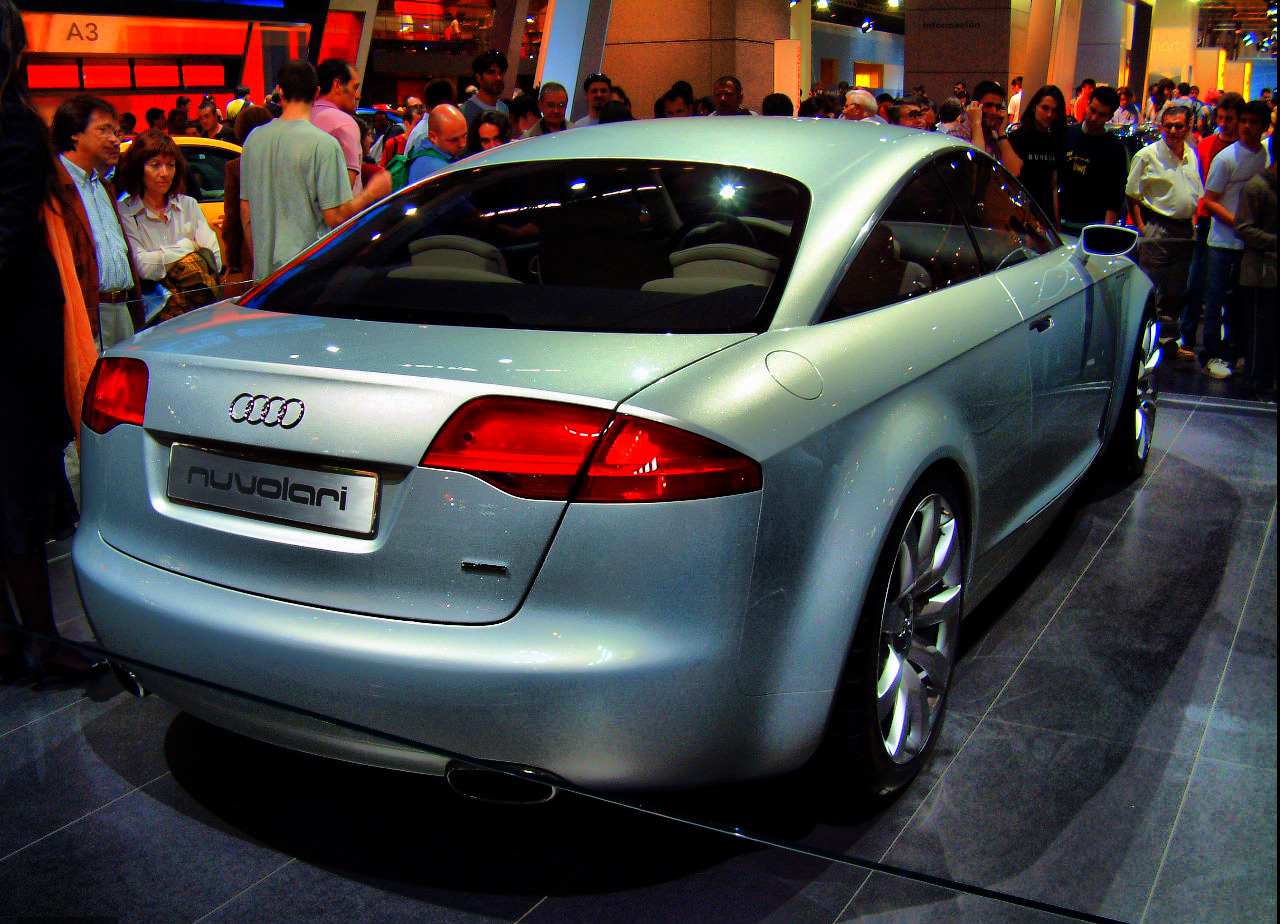 Nuvolari